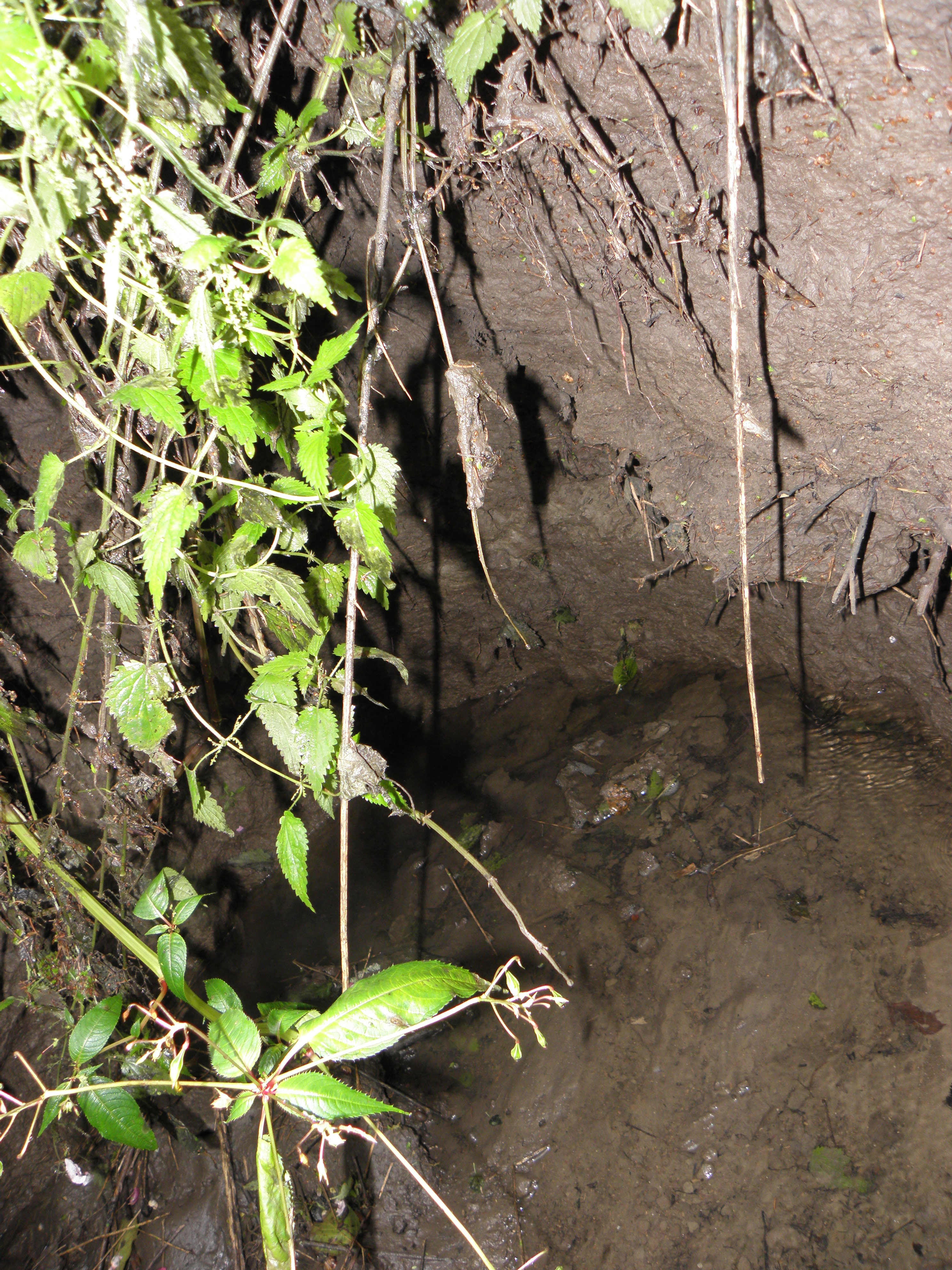 Bachschwinde des Talbachs